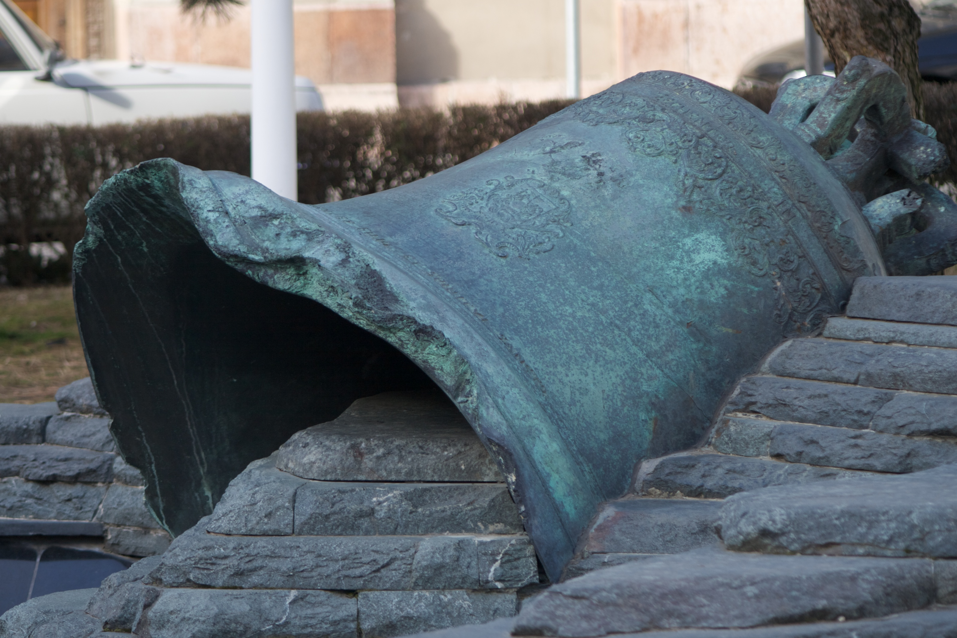 Székesfehérvár bell